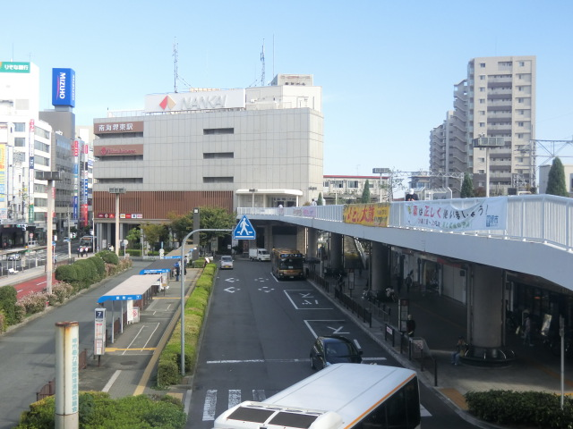 堺東駅西口南方より